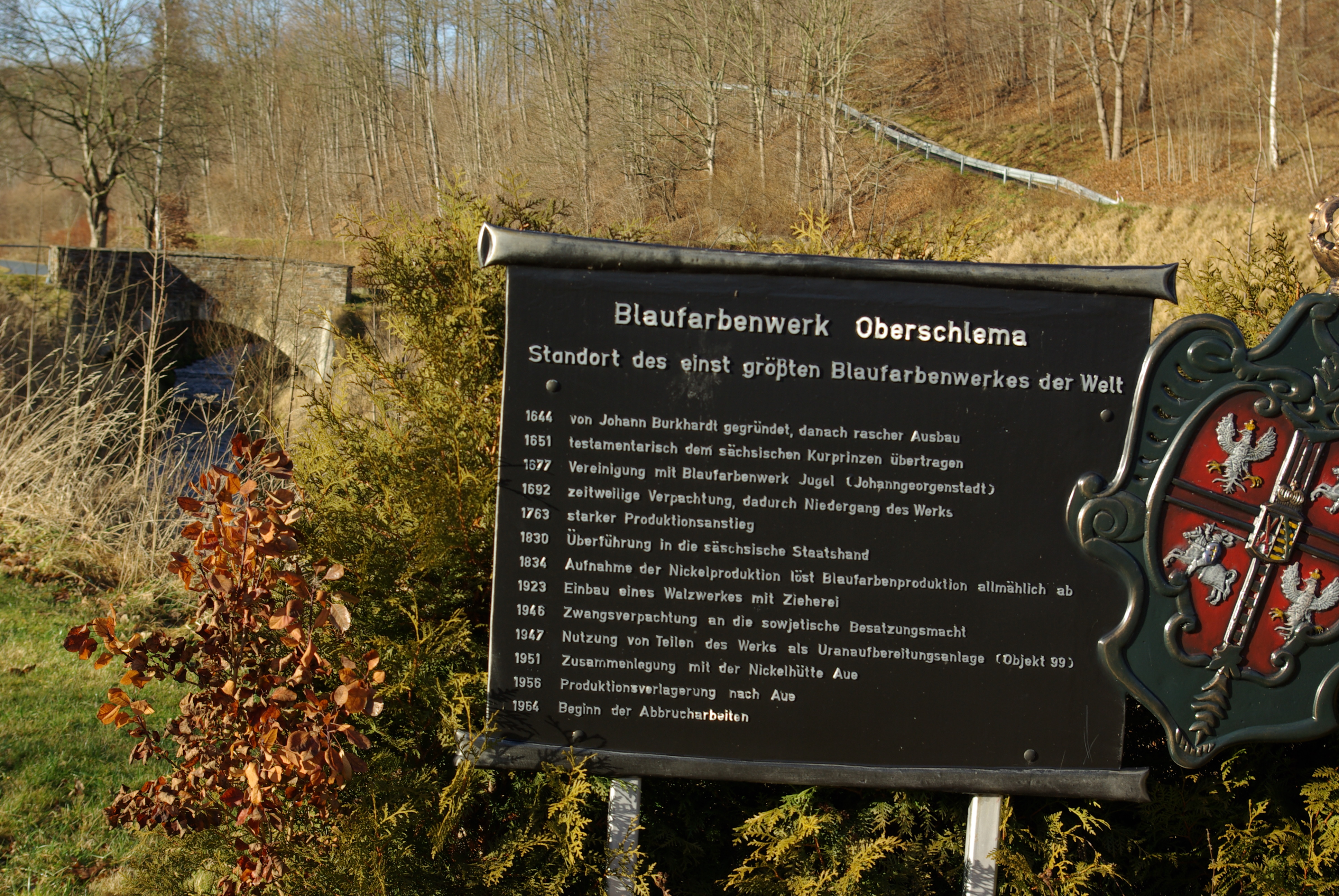 Blaufarbenwerk Oberschlema2